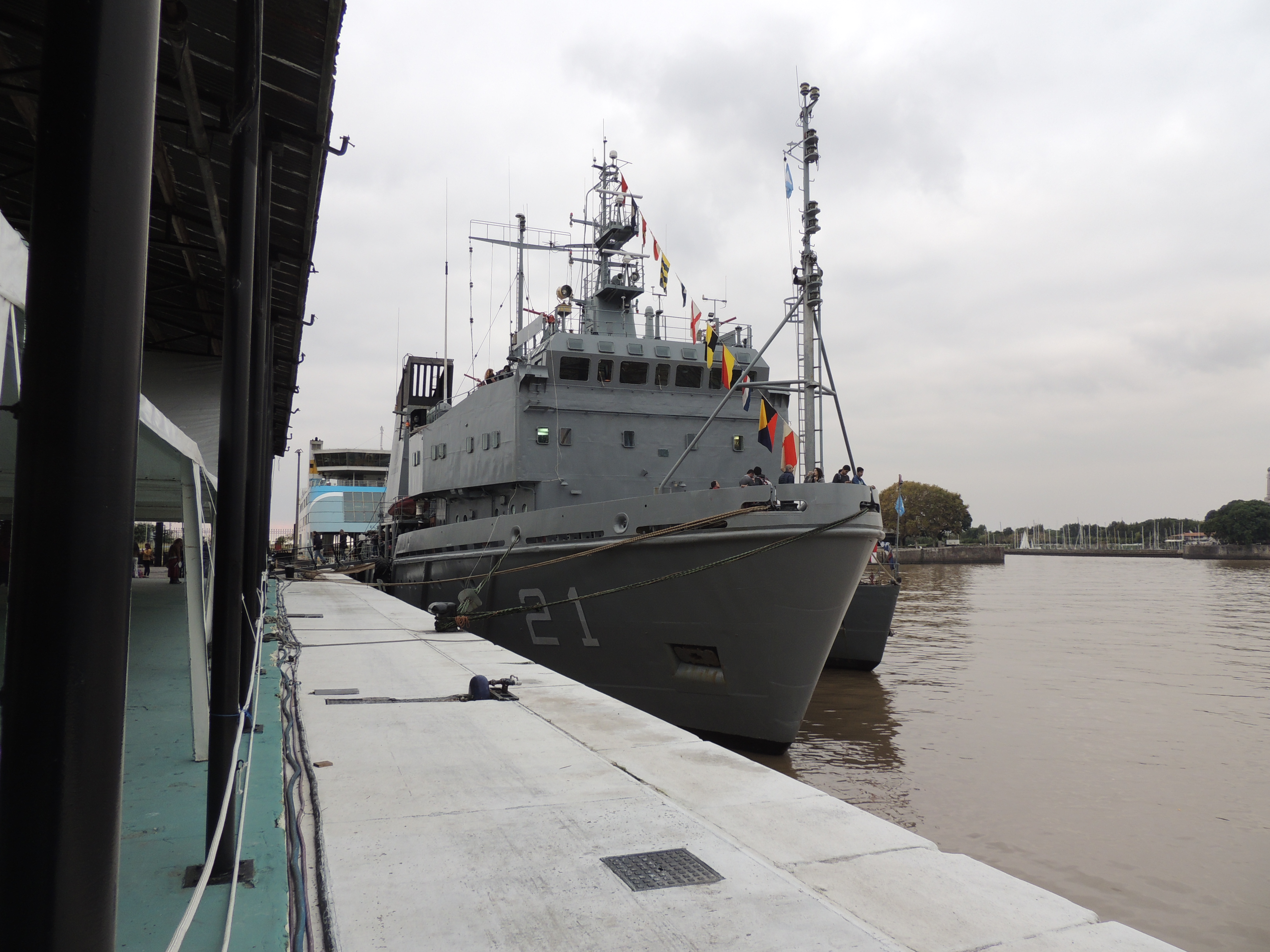 Aviso ARA “Puerto Argentino” en el Apostadero Naval de Buenos Aires, durante una jornada de puertas abiertas en mayo de 2017 por el día de la Armada Argentina.